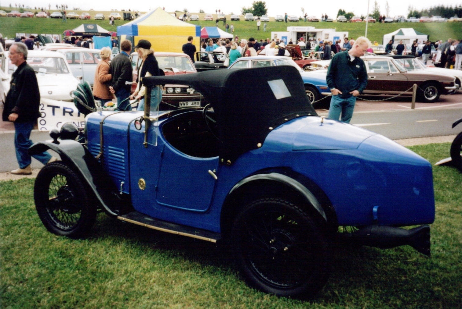 Triumph Super Seven Sports 2/3, 1929. Foto in England